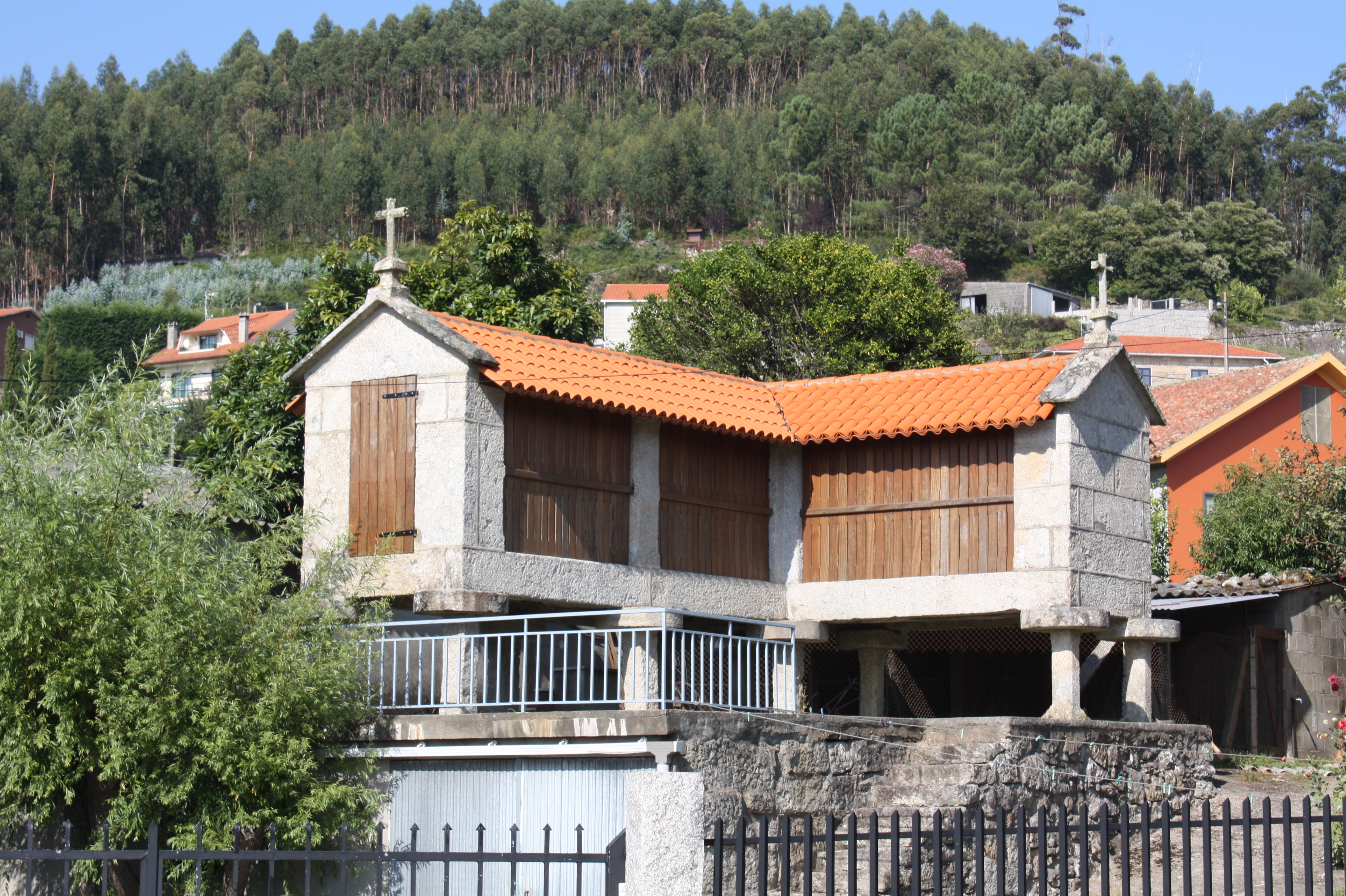 Hórreo con planta en L, en Simes (Meaño, Pontevedra)